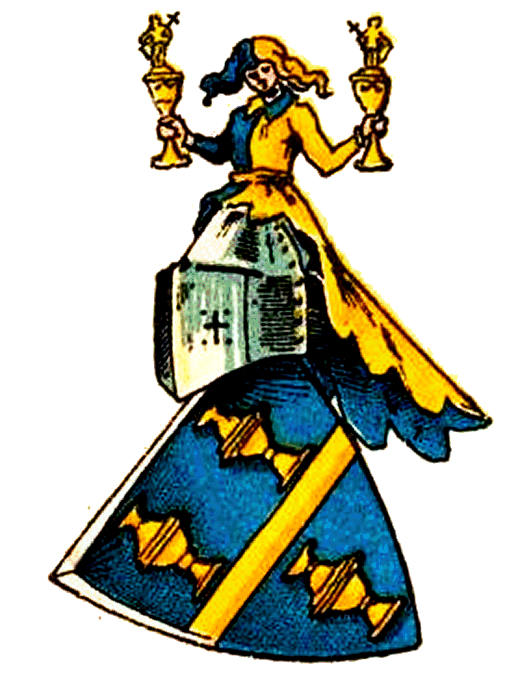 Wappen derer von Goldbeckl